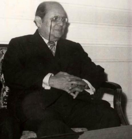 Primirea de către Nicolae Ceauşescu a preşedintelui Partidului Congresului Naţional Indian, Der Kanta Barooah. (6 decembrie 1976)